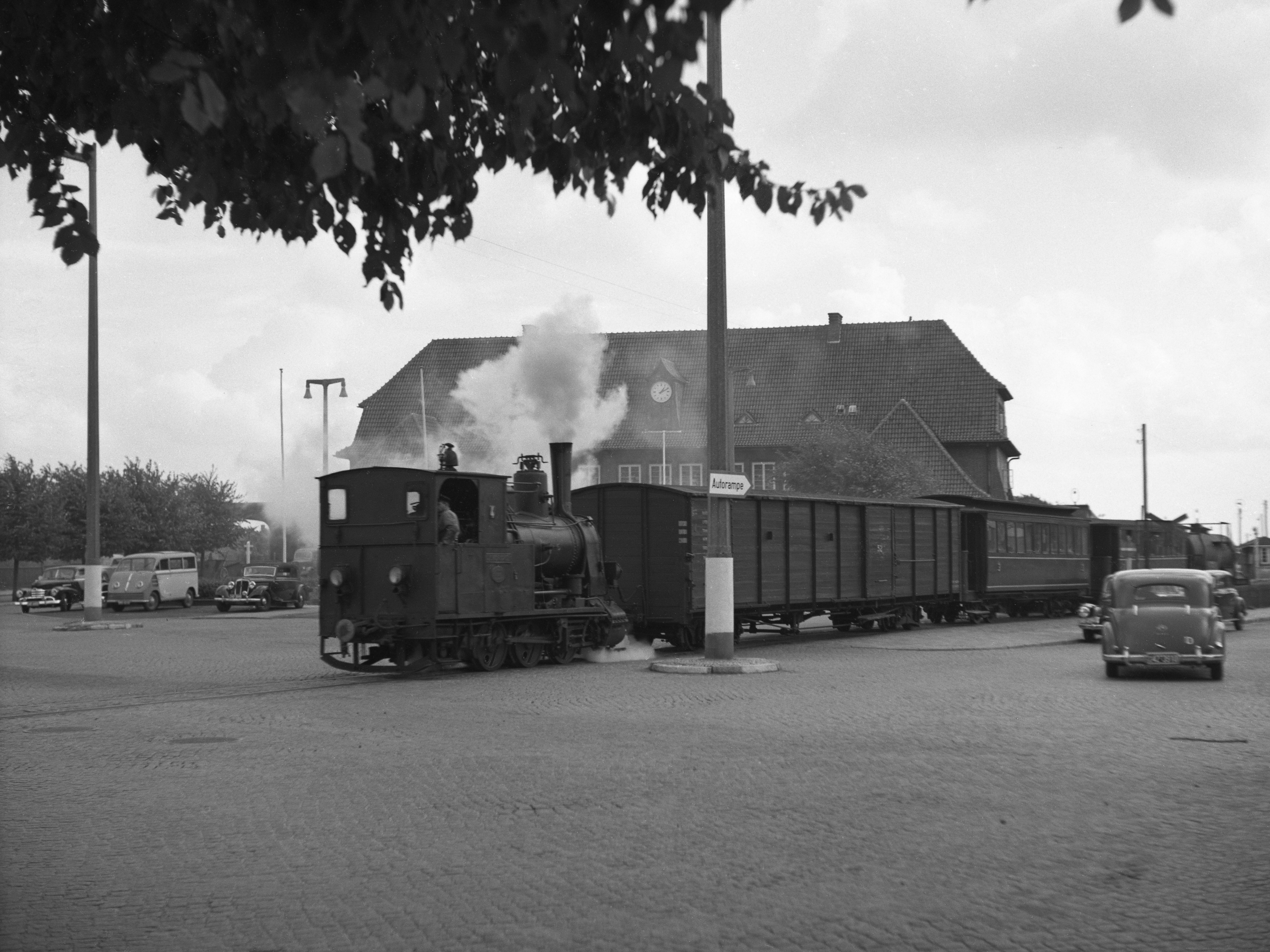 Ausfahrt eines Zuges aus dem Inselbahnhof Westerland auf Sylt in Richtung Norden.